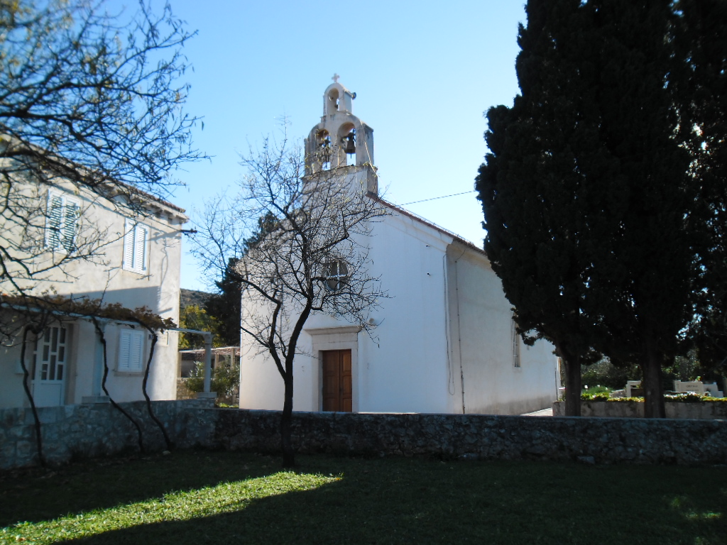 Crkva sv. Marije Magdalene u Banićima